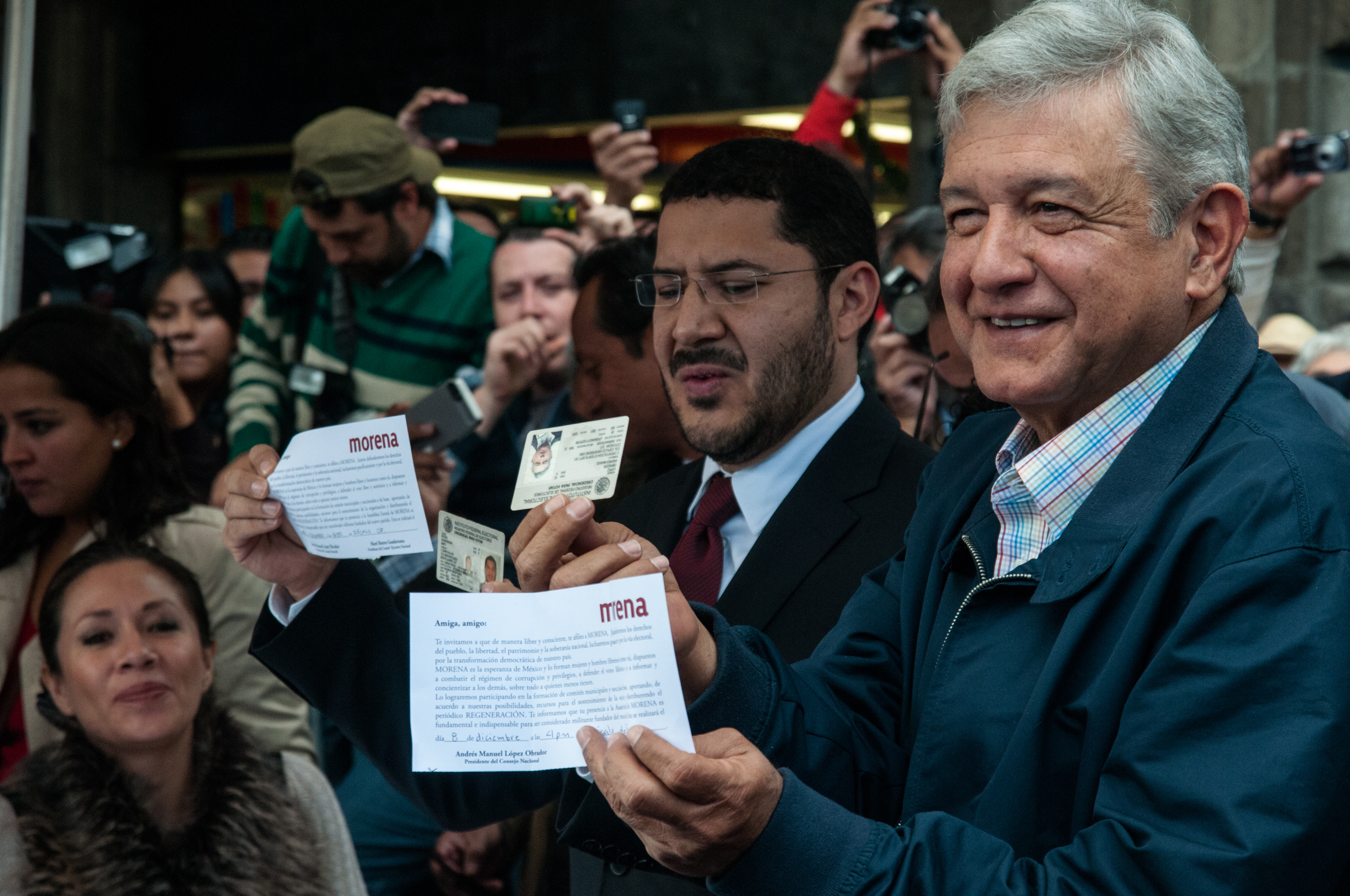 Lee la nota completa en Revolución 3.0 A partir de las 10am la gente comenzó a llegar al módulo de registro para afiliarse a MORENA, la organización que encabeza Andrés Manuél López Obrador y que ayer inició el proceso para registrarse como un partido político. Aproximádamente a las 10:30 comenzaron a llegar diversas figuras de la Izquierda como Clara Brugada, Paco Ignacio Taibo II, Froylan Yescas y Martí Batres, líder nacional de MORENA para realizar su registro. Andrés Manuél llegó a las 11 de la mañana y, entre abrazos y muestras de afecto, se abrió paso entre la multitud para registrarse y lanzar un mensaje a la gente y los medios de comunicación. Después, el registro continuó pues una gran cantidad de gente hacía fila para ser parte de la organización política.